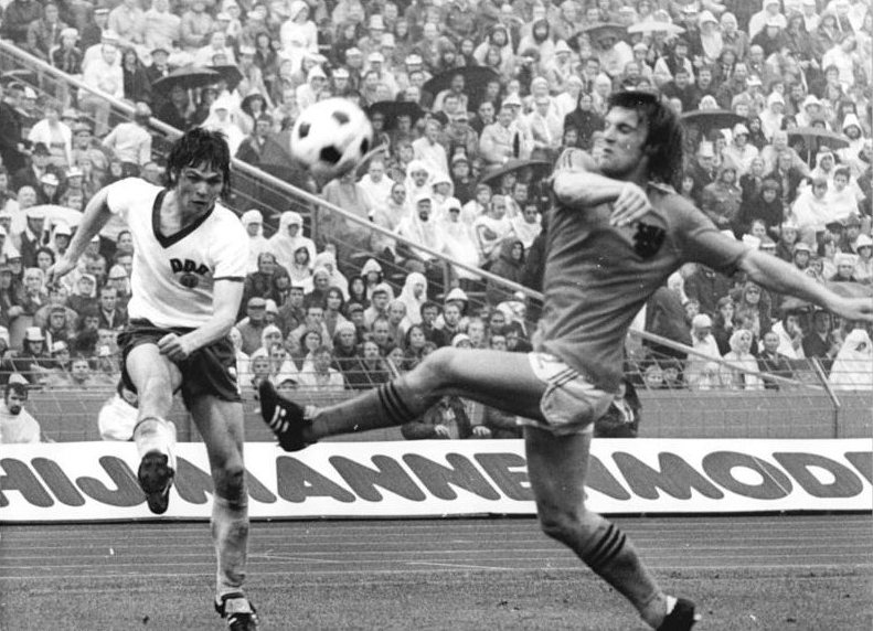 ADN-ZB-Mittelstädt-30.6.74-ma-BRD-Gelsenkirchen: X. Fußball-Weltmeisterschaft-2. Finalrunde, Gruppe A: DDR - Niederlande 0:2- DDR-Spieler Jürgen Pommerenke (links) schießt auf das Tor der Niederlande. Rechts Ruud Krol (Niederlande).